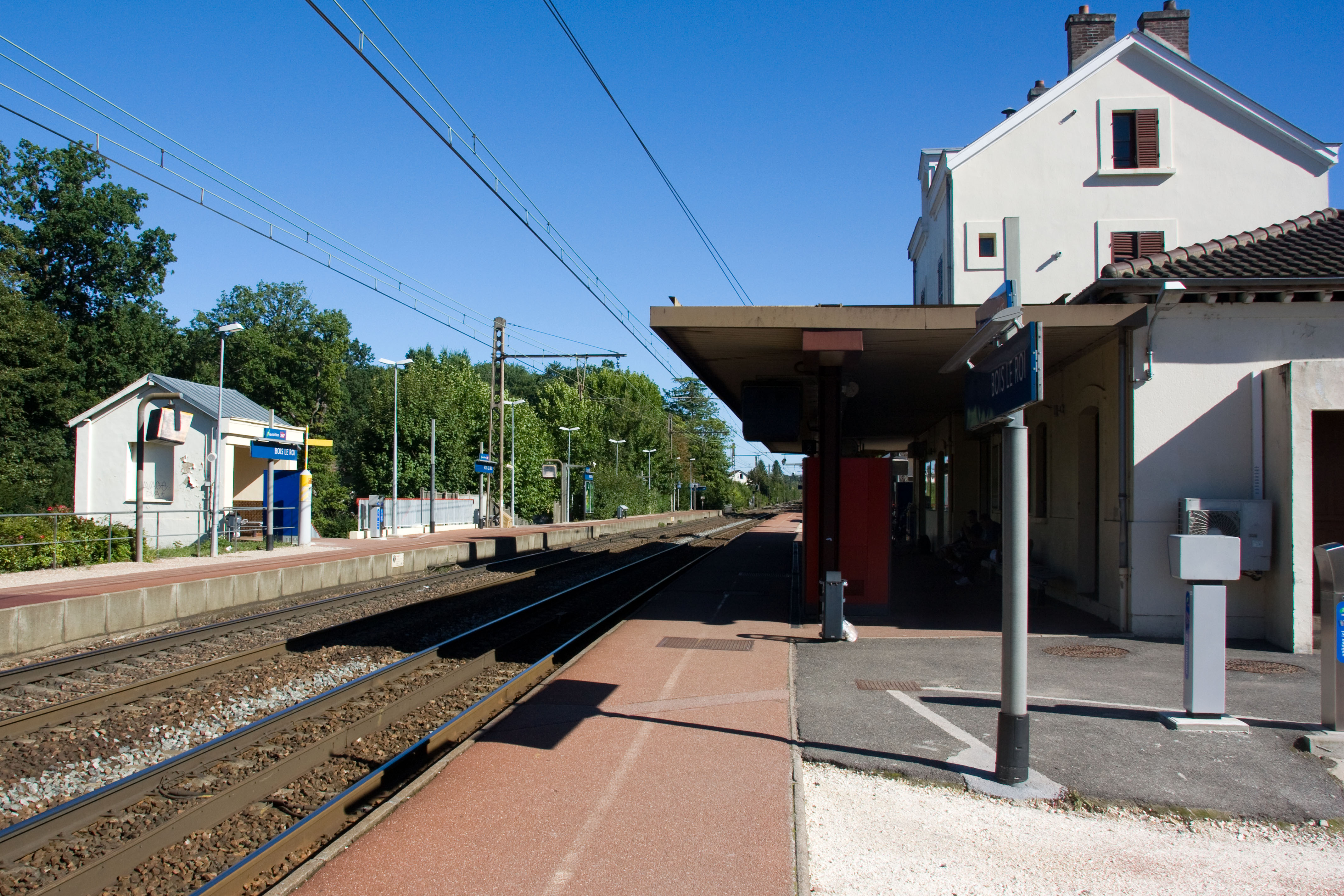 Gare de Bois-le-Roi, Bois-le-Roi, Seine-et-Marne, France